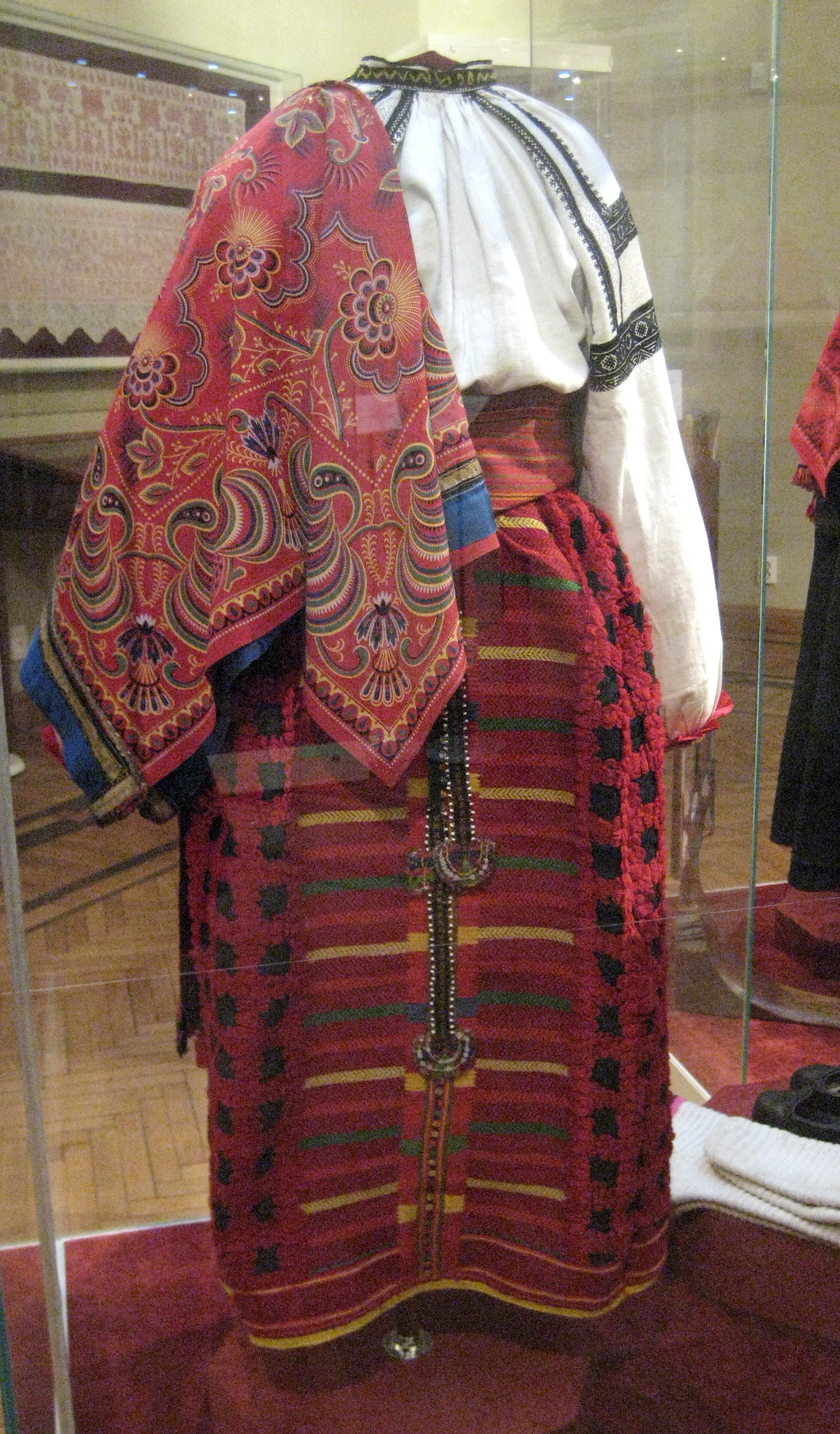 Женский праздничный костюм: рубаха, понёва, передник-занавеска, нагрудное украшение, платок, пояс, поясное украшение, башмаки, чулки. Воронежская губерния, Бирючинский уезд. Конец 19 - нач. 20 века.